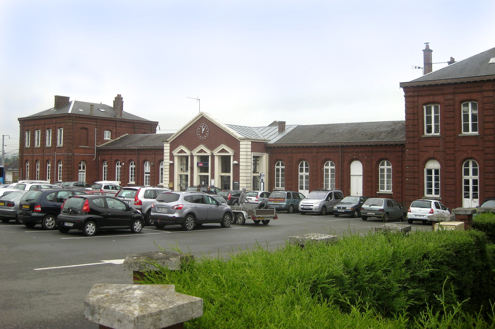 Le bâtiment voyageurs de la gare de Serqueux vu côté cour.